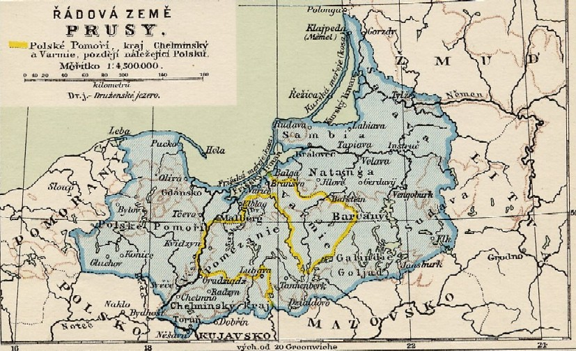 Prusko Řádová země Prusko kolem roku 1350 Pramen: Historicko-zeměpisný atlas školní starého, středního a nového věku, nakladatelství V. Neubert a synové, Praha (cca. 1923) jména autorů map nejsou nikde uvedena, jedná se o dílo ve smyslu § 59 Autorského zákona